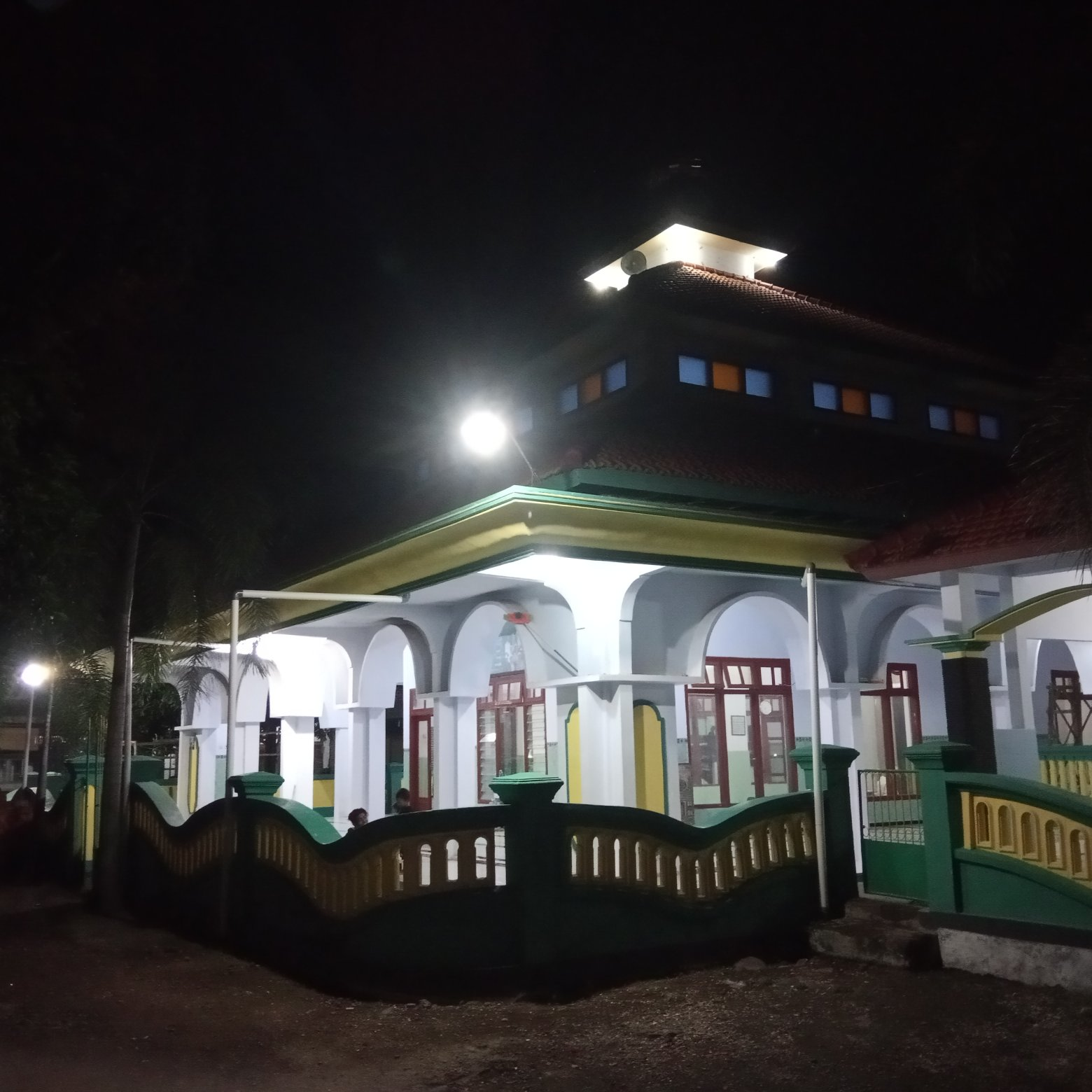 Gambar Masjid Al Karomah pada malam hari